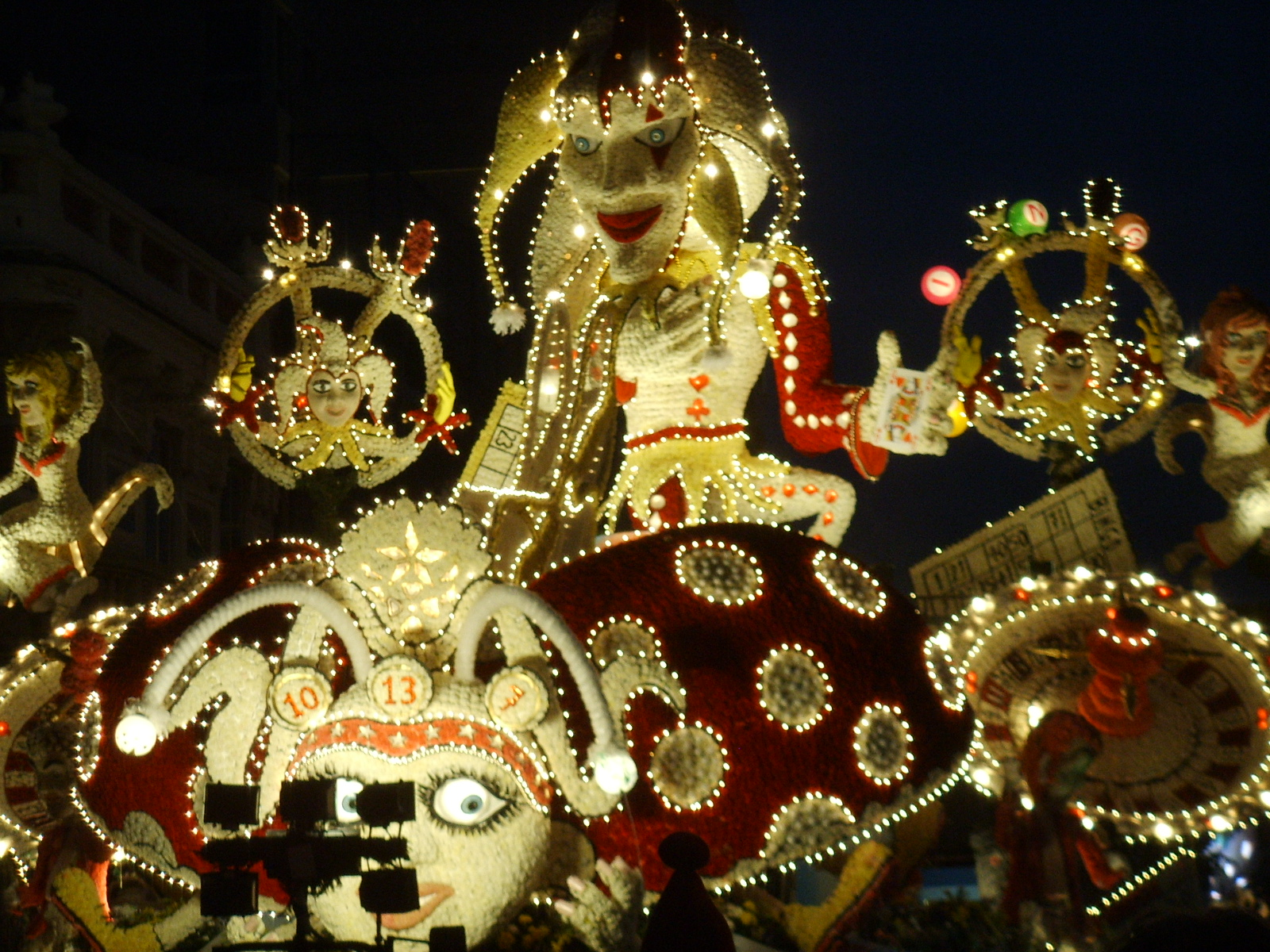 Carnevale di acireale 208, carro infioreto vicnitore, giù la maschera